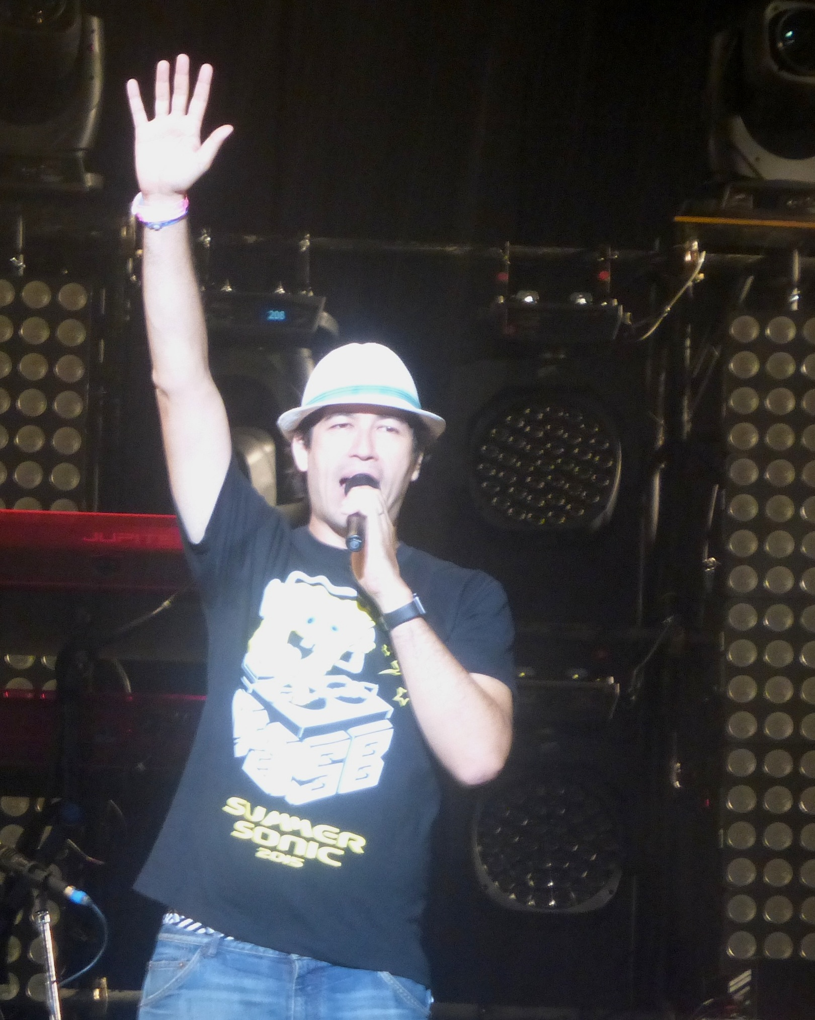 サッシャ（Sascha 1976年9月22日 - ）は、ラジオDJ、ナレーター。ドイツ・ヘッセン州生まれ。本名はSascha Boeckle（ザッシャ・ベックレ）、血液型はB型。2015年のサマーソニックにて